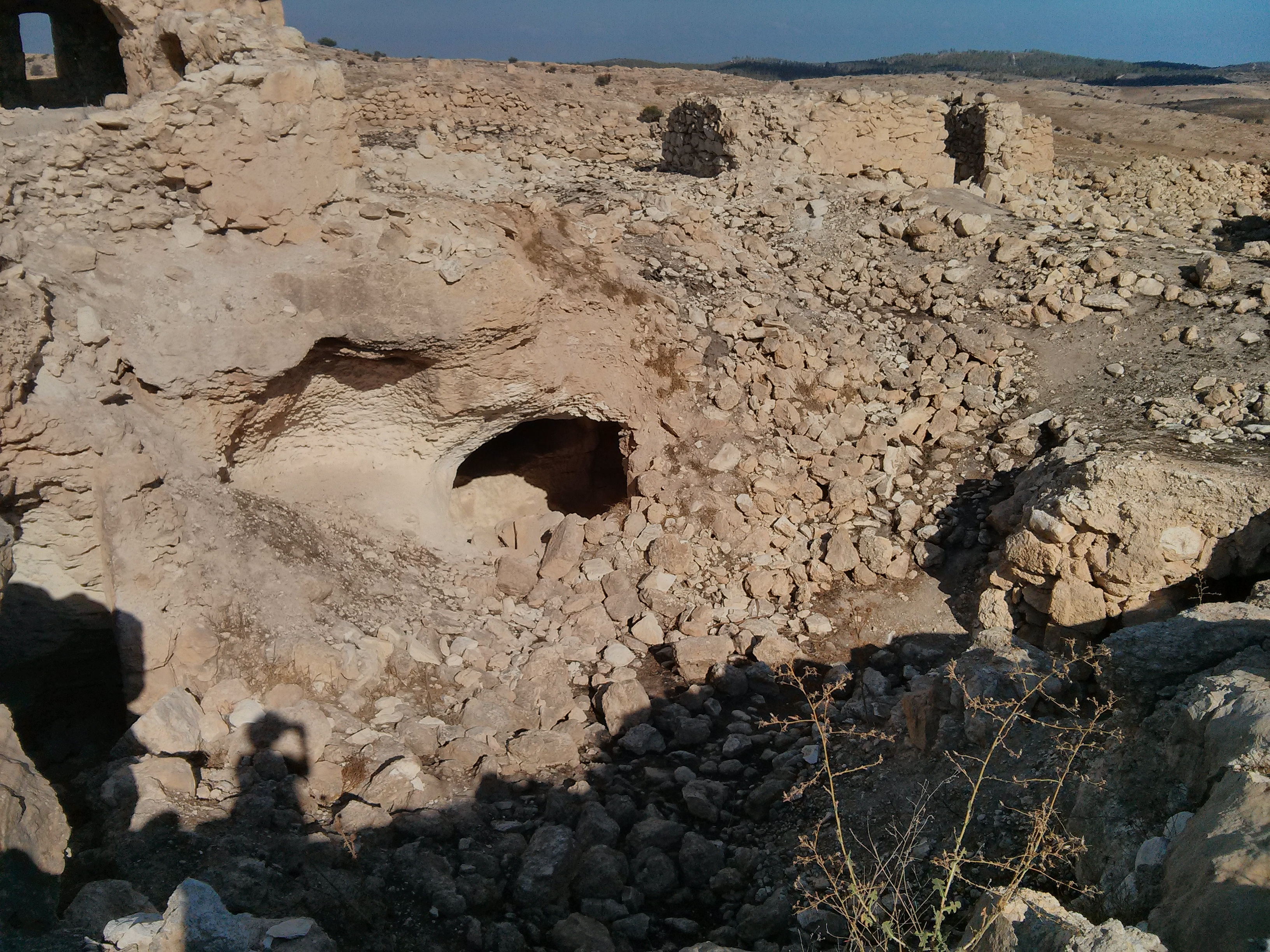 כניסה למחילה תת-קרקעית בחירבת אום אל-שקף, ליד אמציה